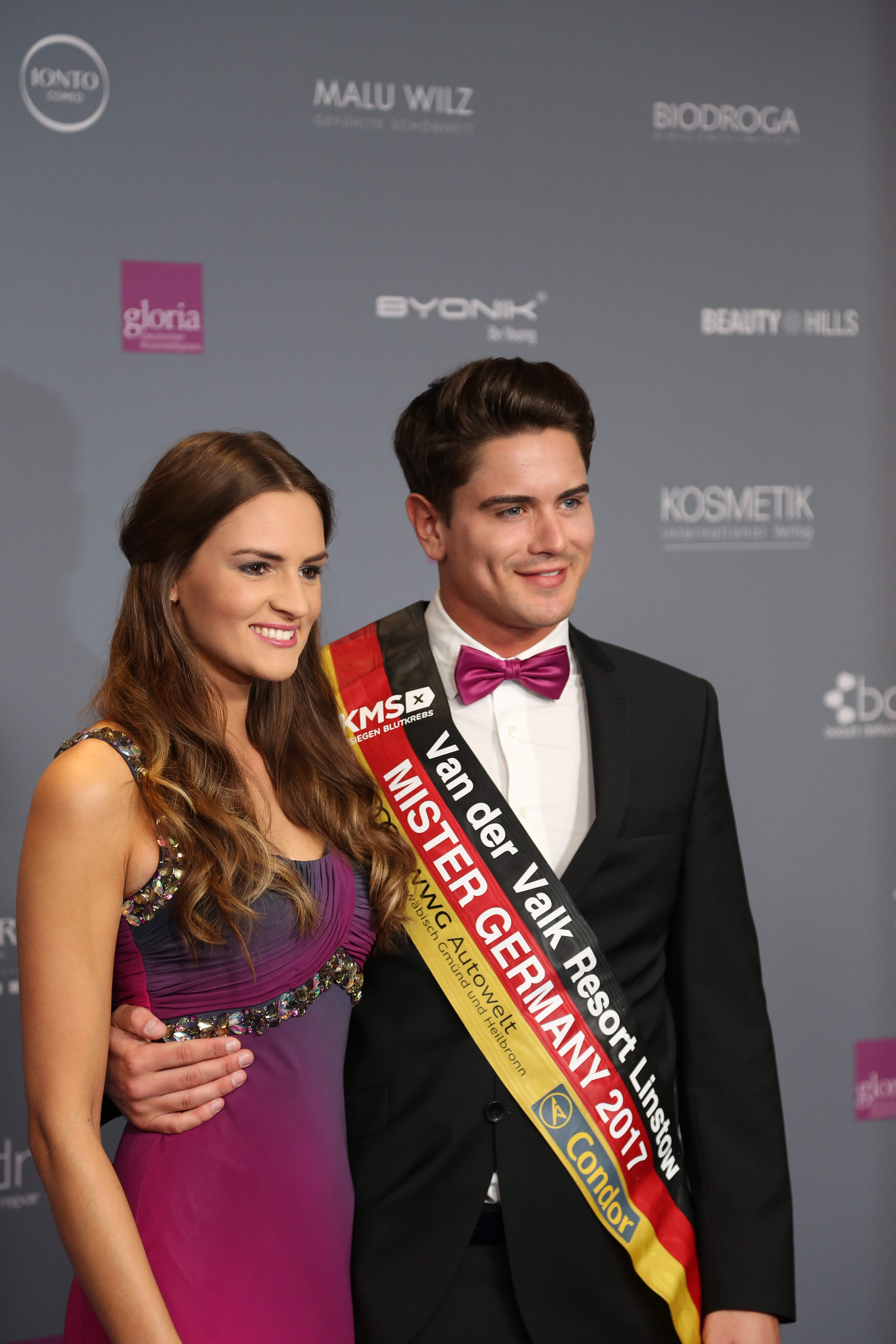 Lena Broeder und Dominik Bruntner beim "Gloria – Deutscher Kosmetikpreis" am 31. März 2017 im Hilton Hotel Düsseldorf.